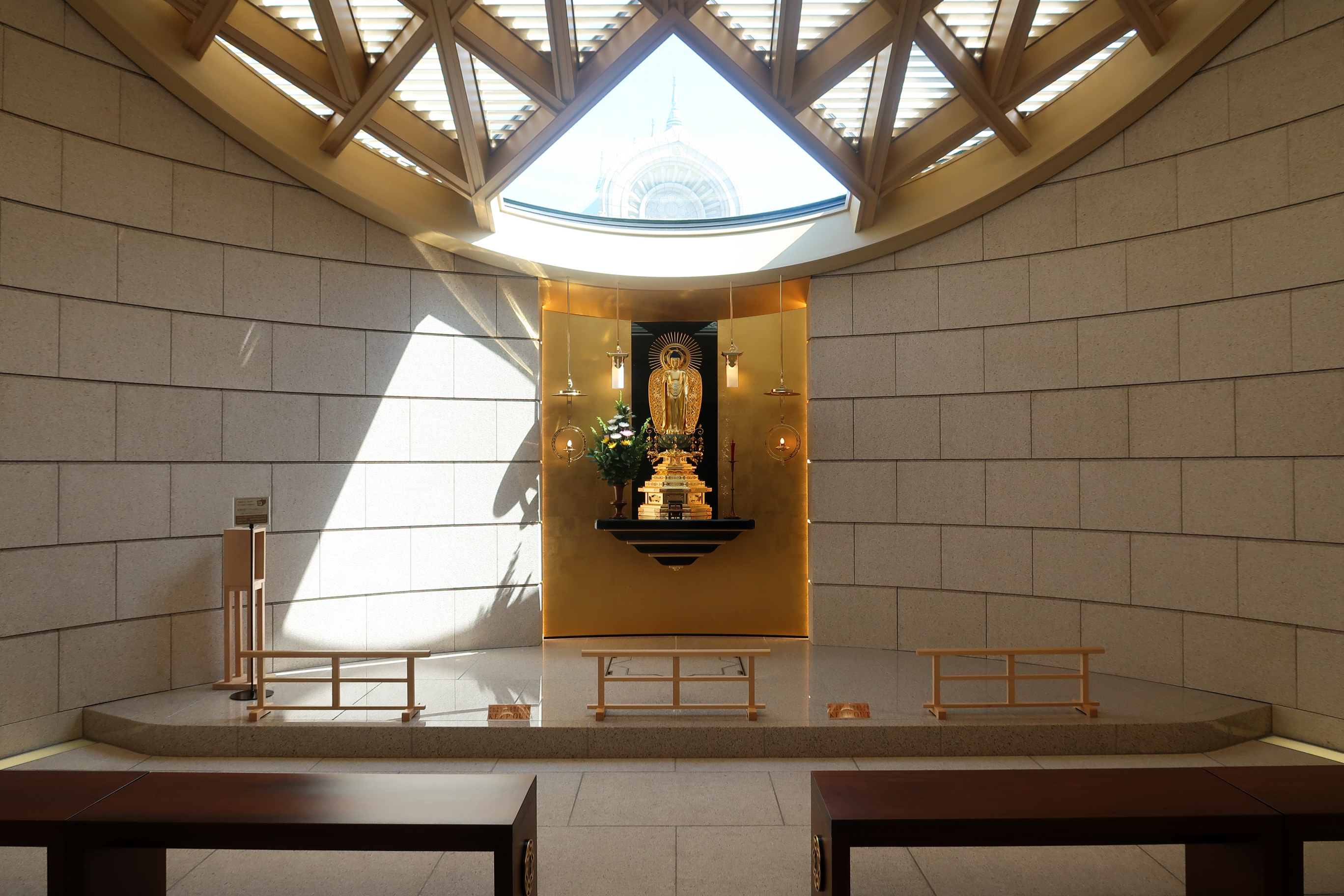 Tsukiji Hongan-ji